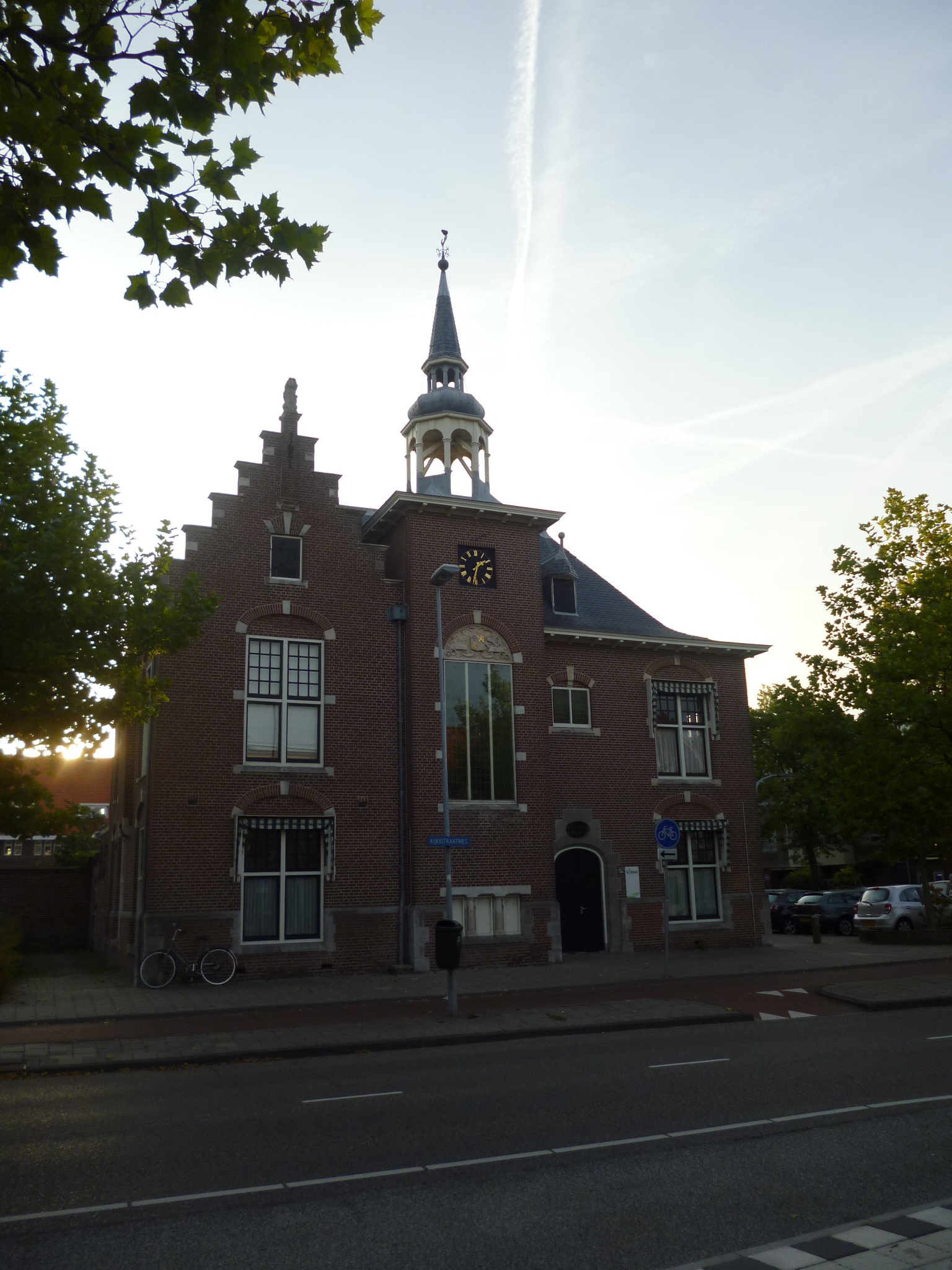 Rijksstraatweg 24 Haarlem